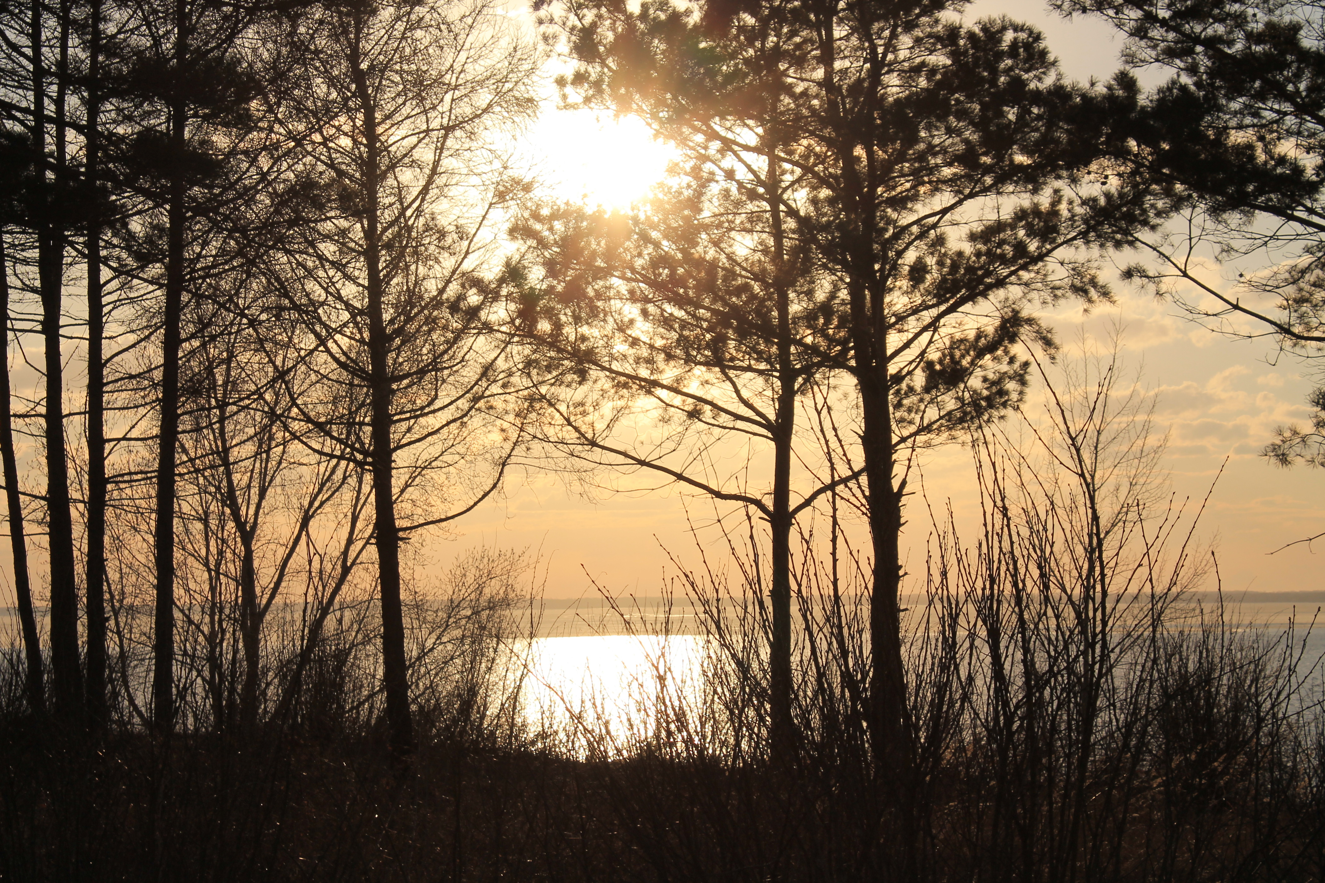 Городской парк „Бердская коса“ города Бердска, Бердск This image is related to the protected area of Russia number 5420011